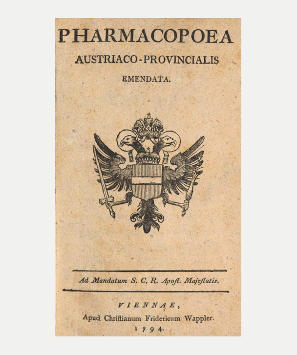 Titelblatt